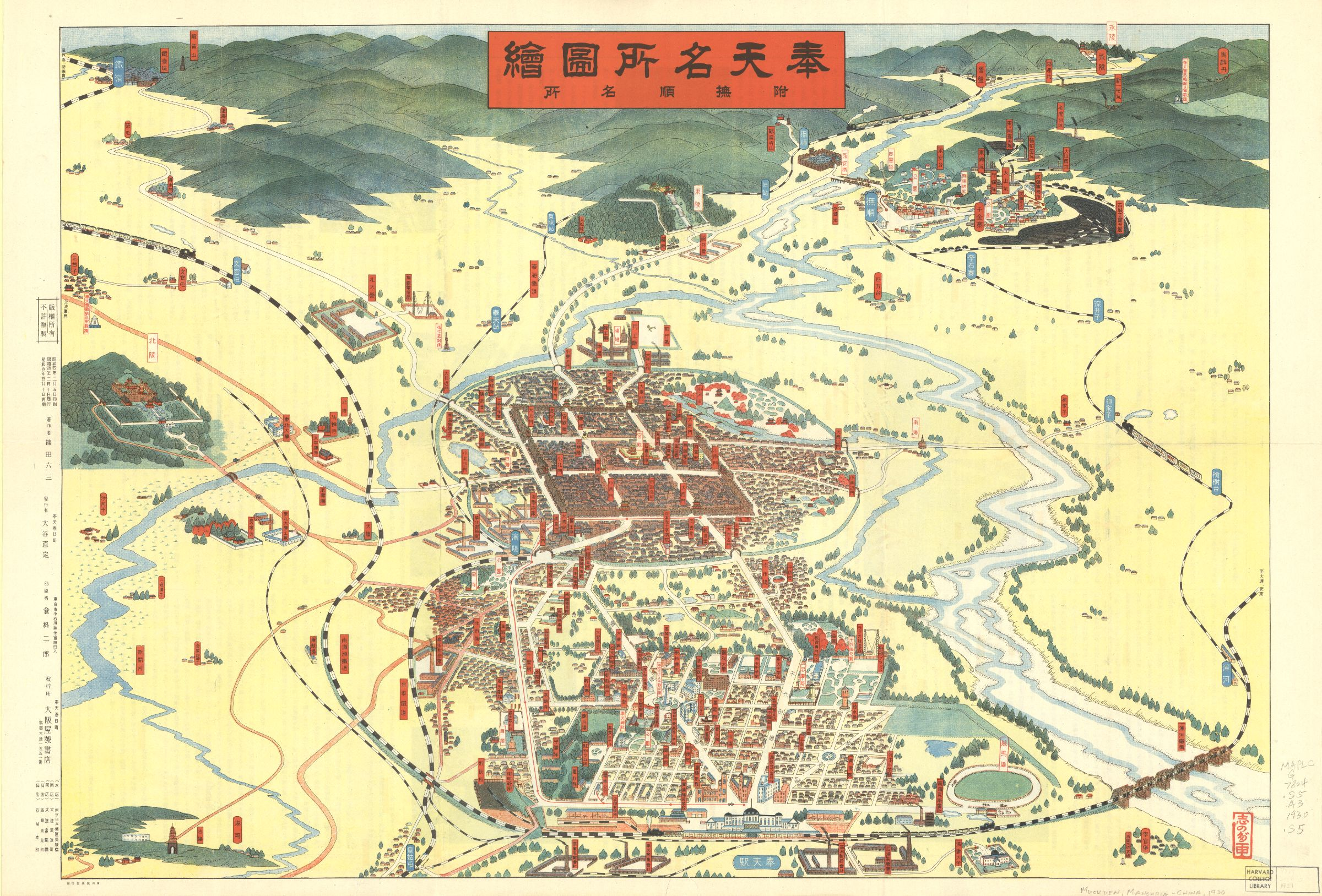 中文（中国大陆）: 奉天名所图绘（附：抚顺名所）